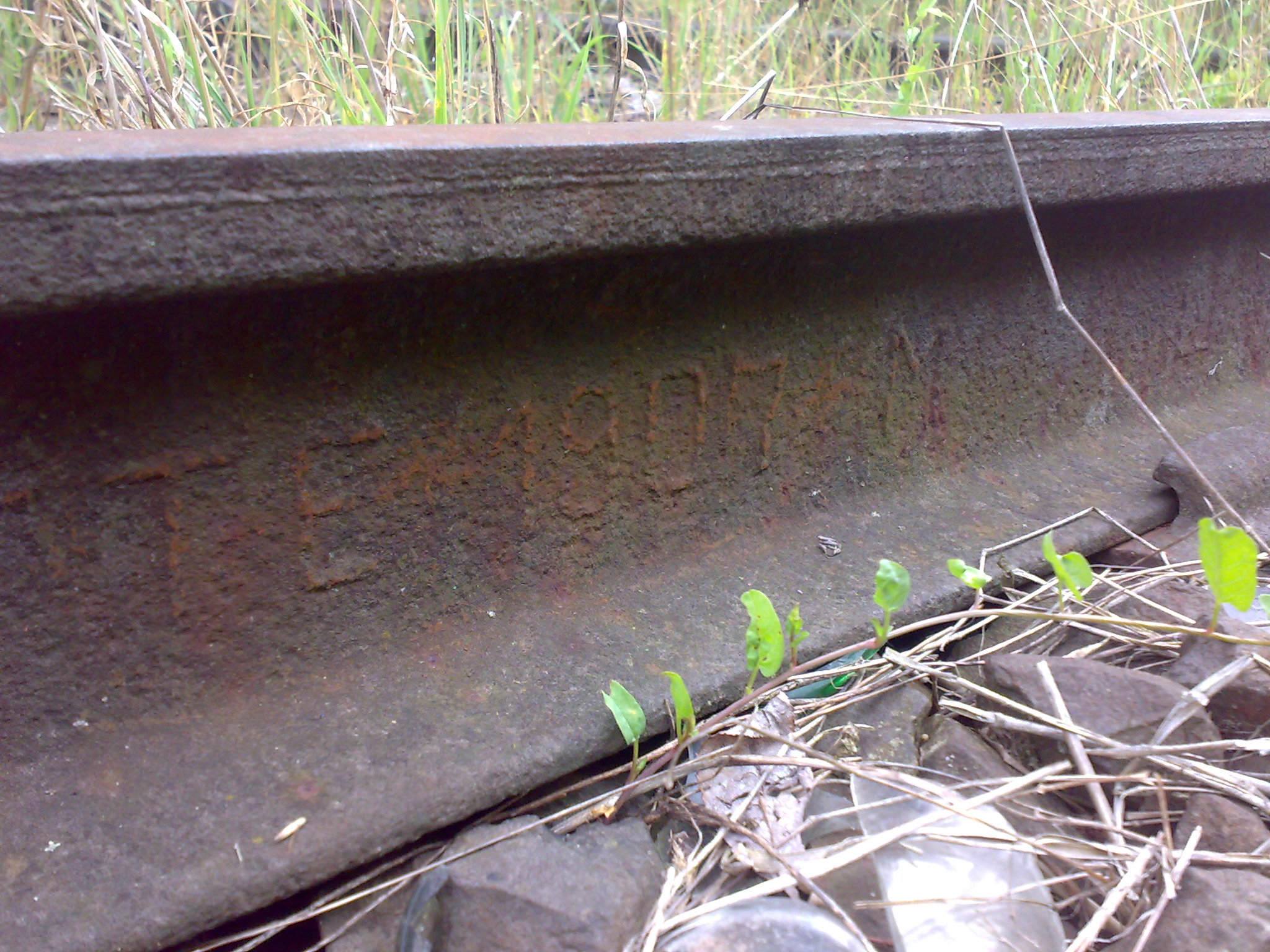 Dobrze zachowana szyna kolejowa z 1907 roku